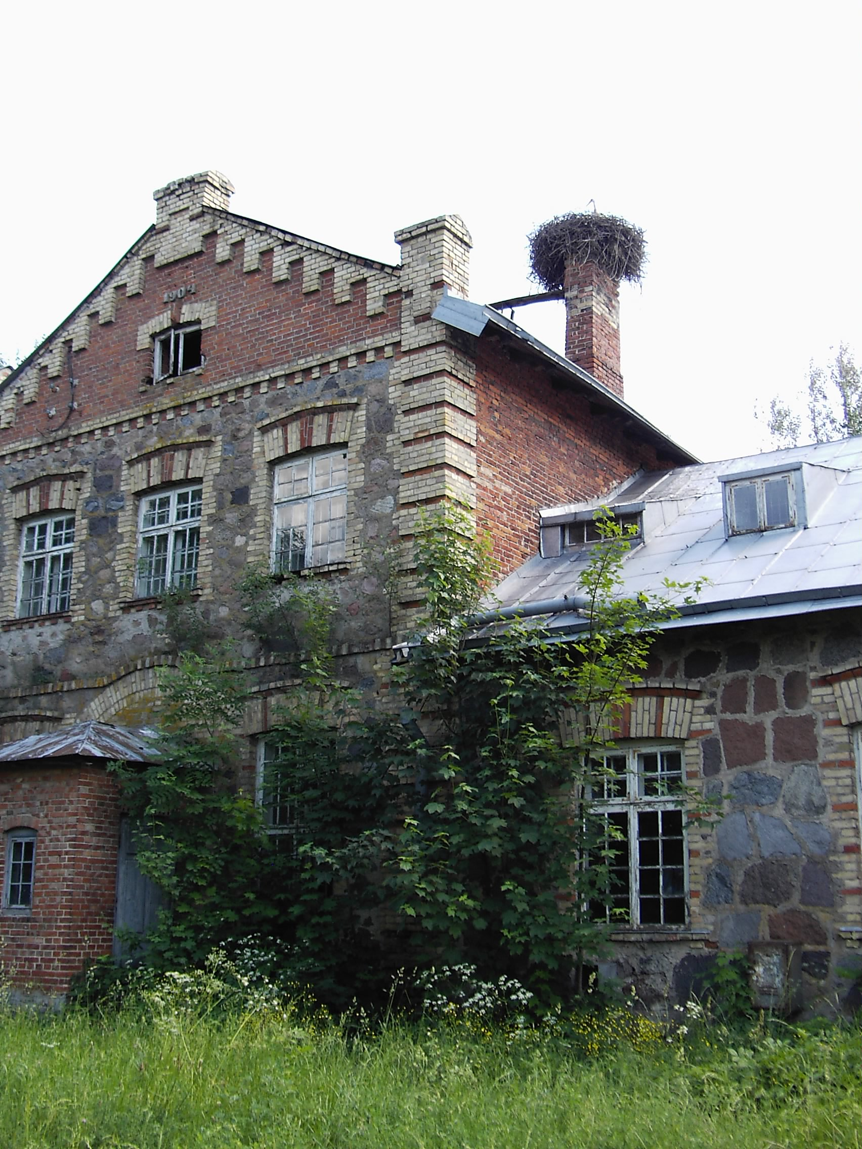 StrażnicaHołny WolmeraKOP WOP SG - obecnie_pustostan.